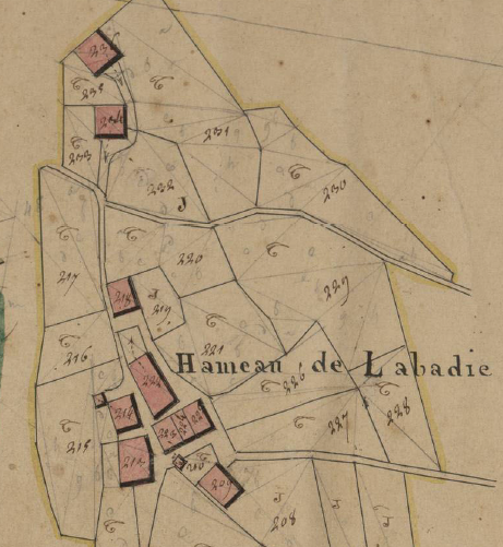 L'Abadia, de Serrallonga, en el Cadastre napoleònic del 1812 (Arxius Departamentals dels Pirineus Orientals)